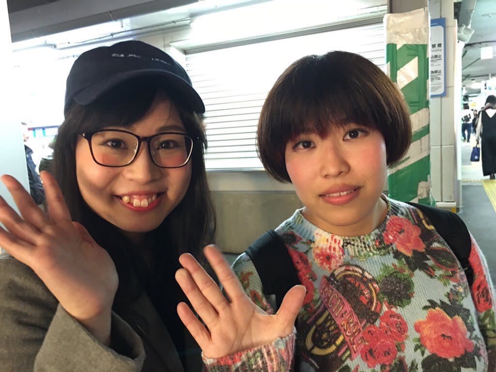 ラムズ 5